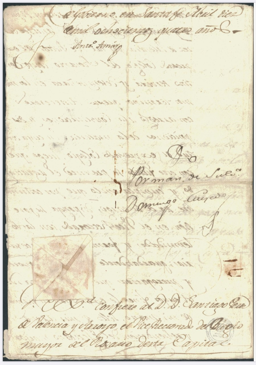 Nombramiento de Santiago Arroyo y Valencia como Vicerrector del Colegio Mayor del Rosario, Bogotá